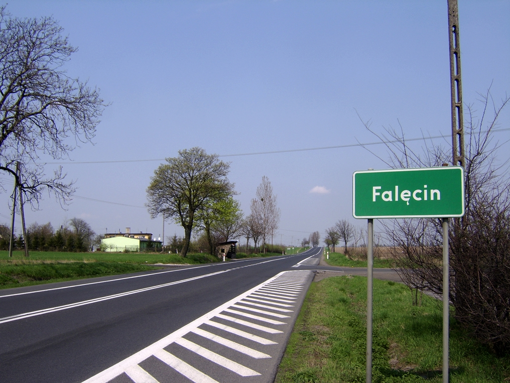 Wieś Falęcin